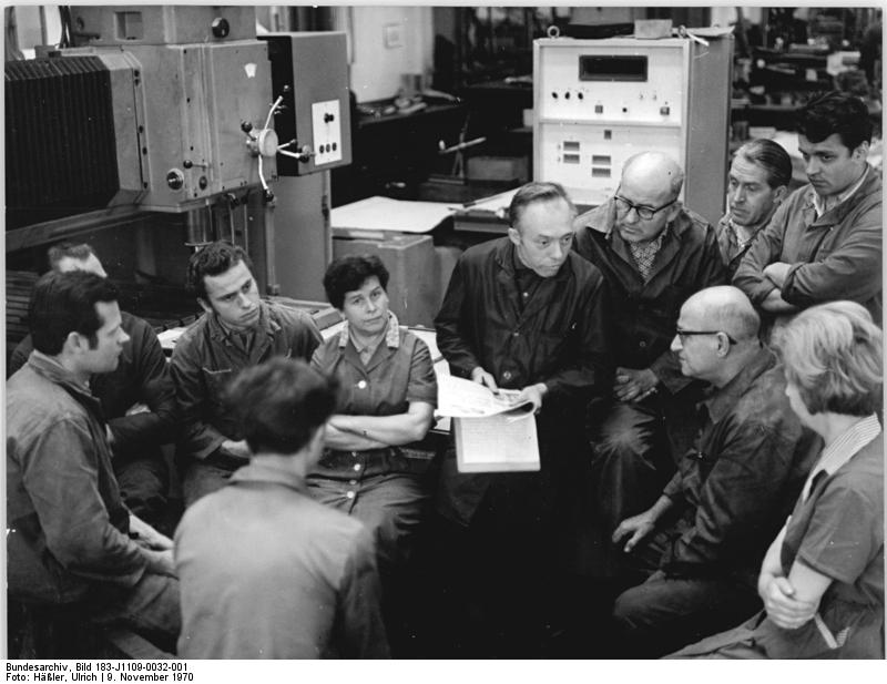 Zentralbild Häßler 9.11.1970 Dresden: Werktätige des VEB Mikromat verurteilen faschistische Provokation in Westberlin Auf einer Zusammenkunft verurteilten die Mitglieder der Brigade "20. Jahrestag der Gründung der DDR" des VEB Mikromat Dresden den Mordanschlag auf die sowjetischen Soldaten am Ehrenmal im Westberliner Bezirk Tiergarten. Alle Werktätigen stimmten der von Meister Christian (M) vorgetragenen Protestresolution zu.